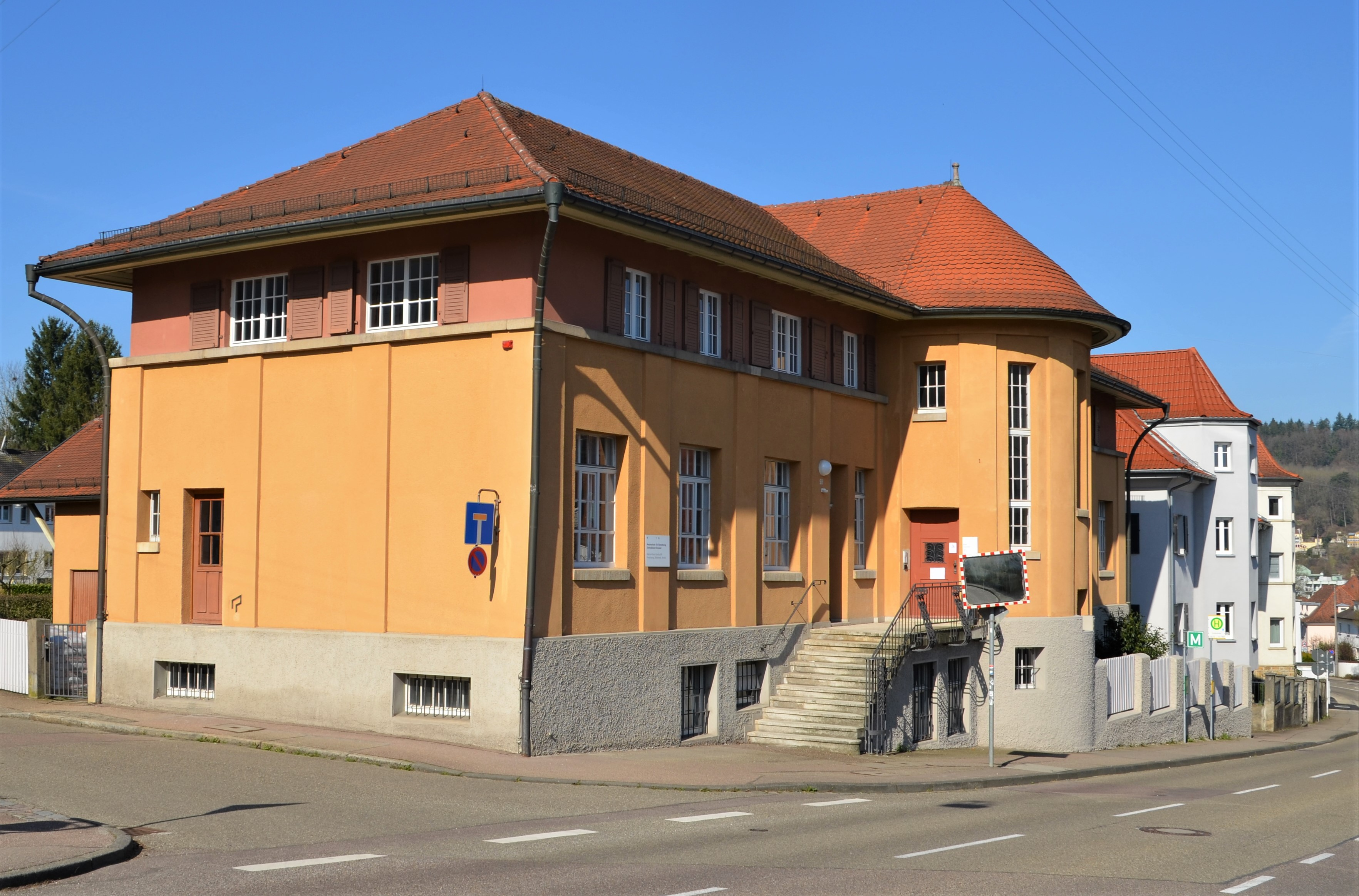 Nebengebäude der HfG Gmünd in der Rektor-Klaus-Straße von Süden aufgenommen